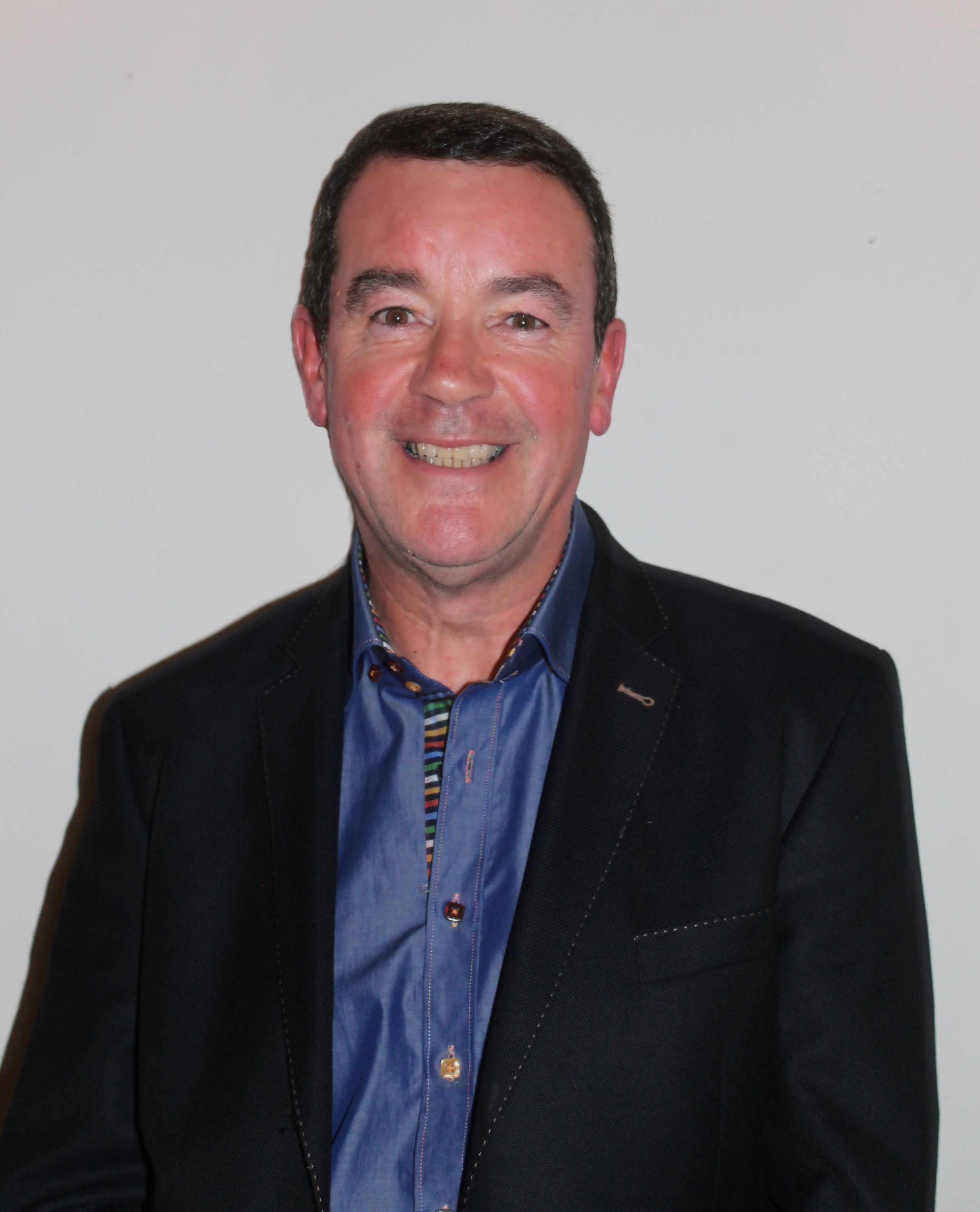 Nic Parry, yn 2014